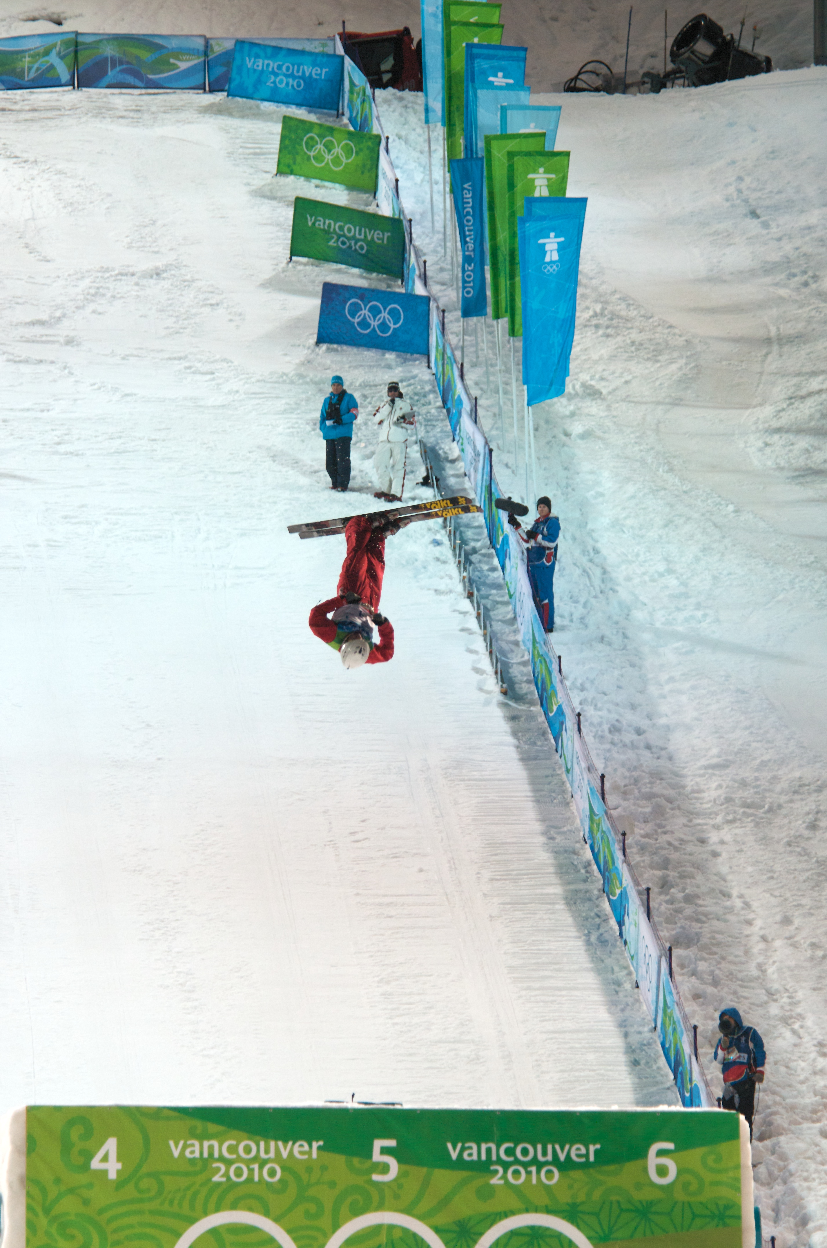 Freestyle Skiing Men's Aerials Final